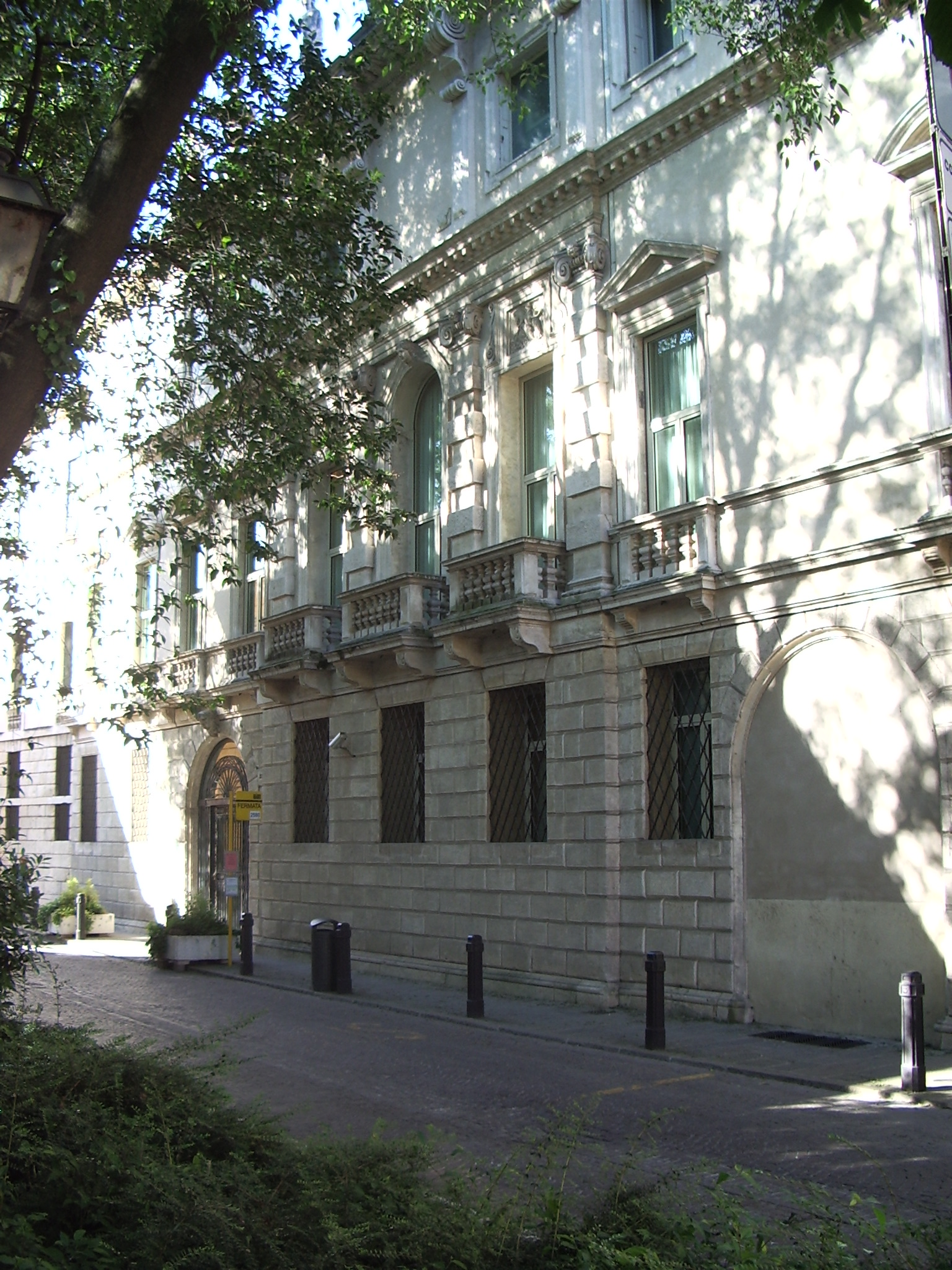 Facciata Palazzo Leoni Montanari